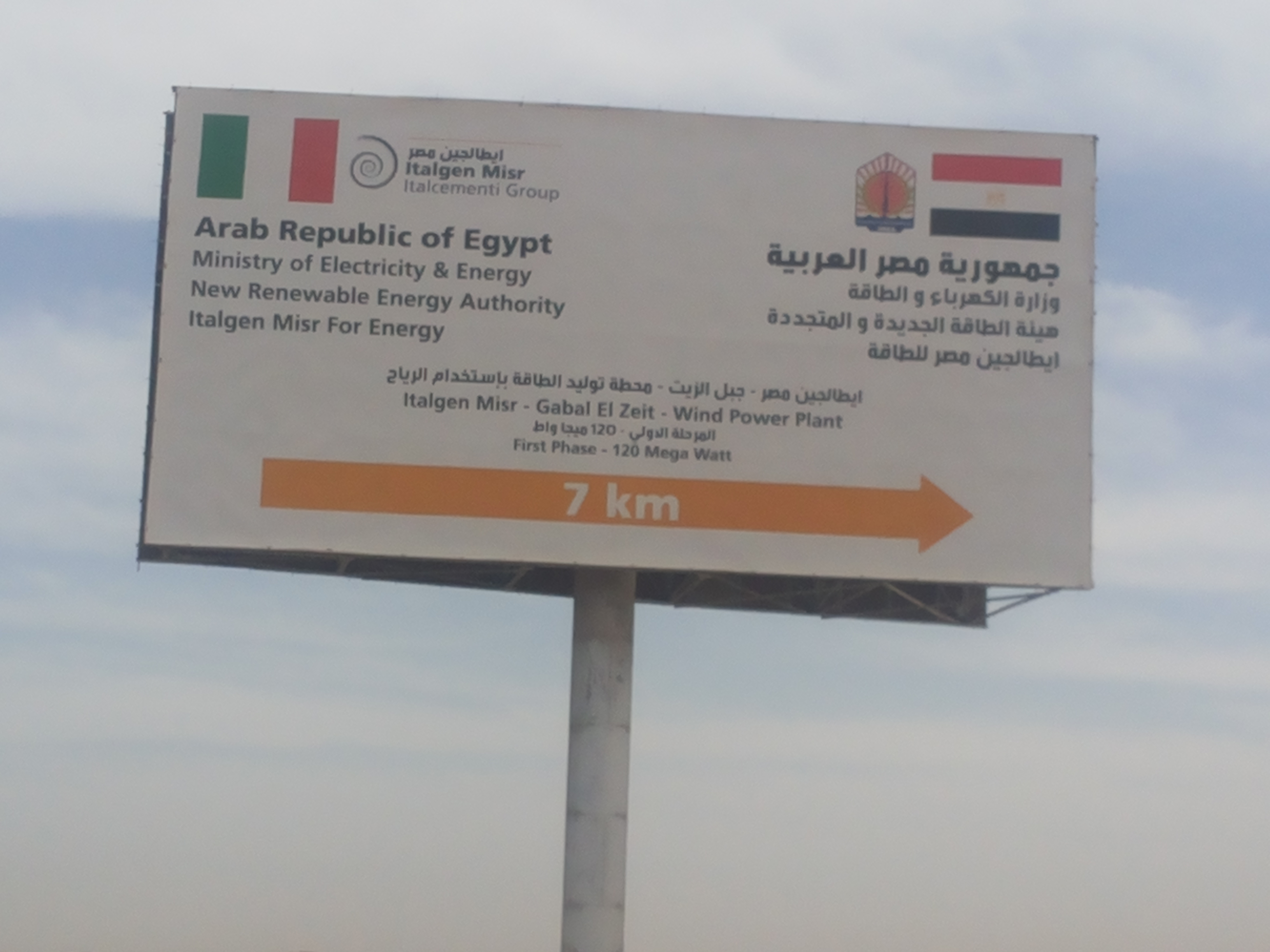 مشروع تعاون مصري إيطالي في مجال الطاقة الجديدة والمتجددة، طريق رأس غارب الصحراوي، مصر